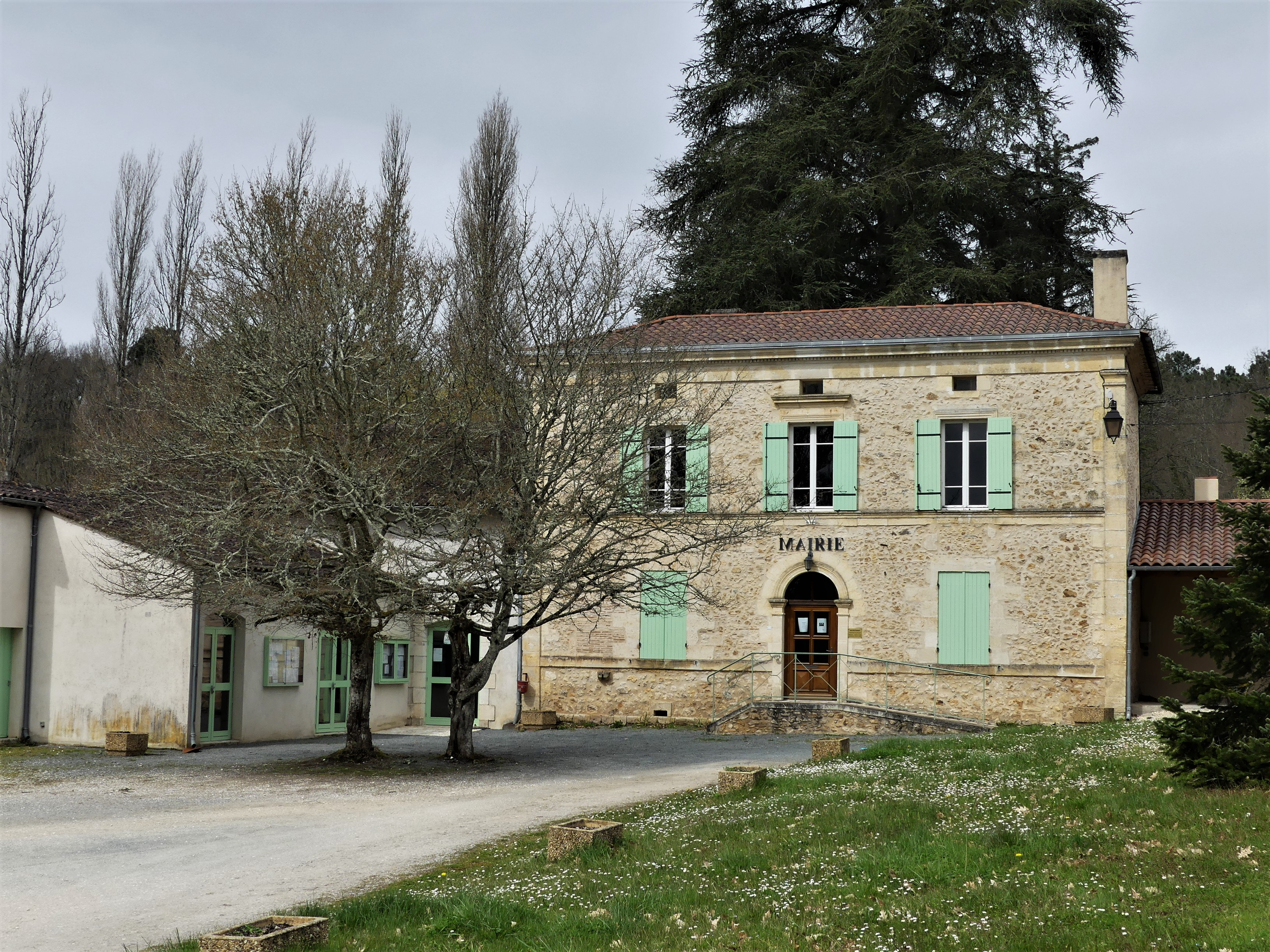 La mairie d'Église-Neuve-d'Issac, Dordogne, France.